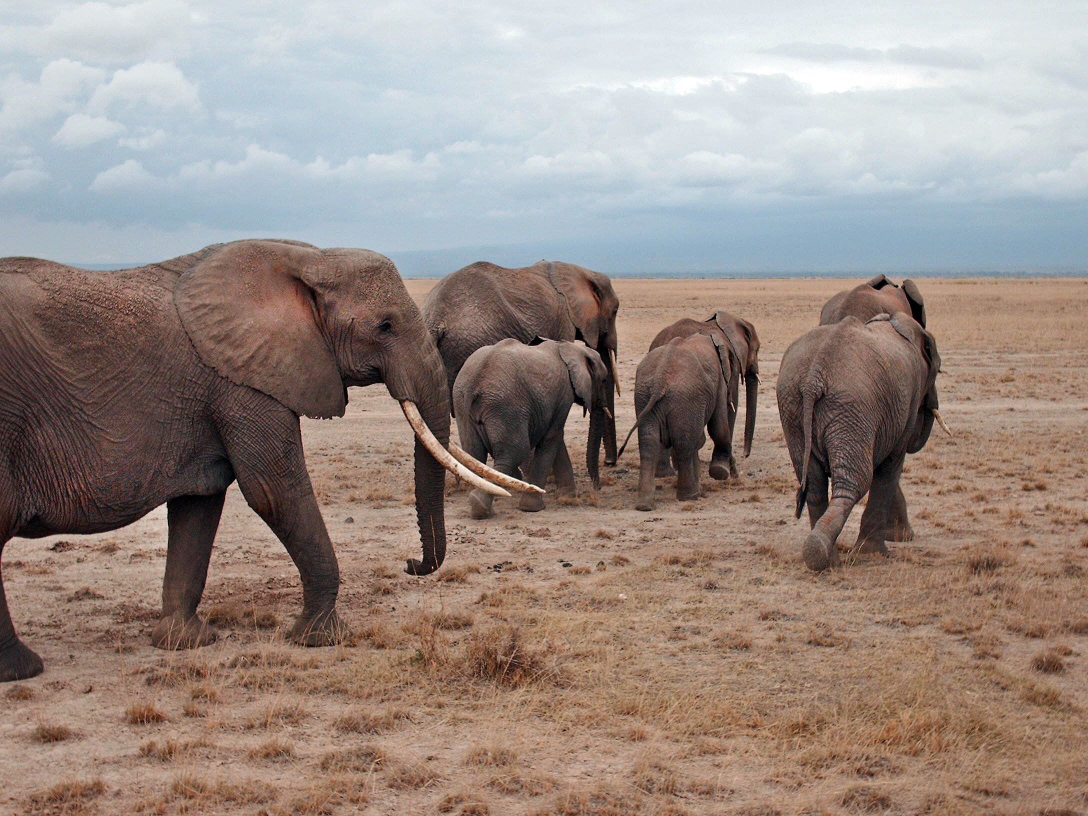 six Elephants in Kenya